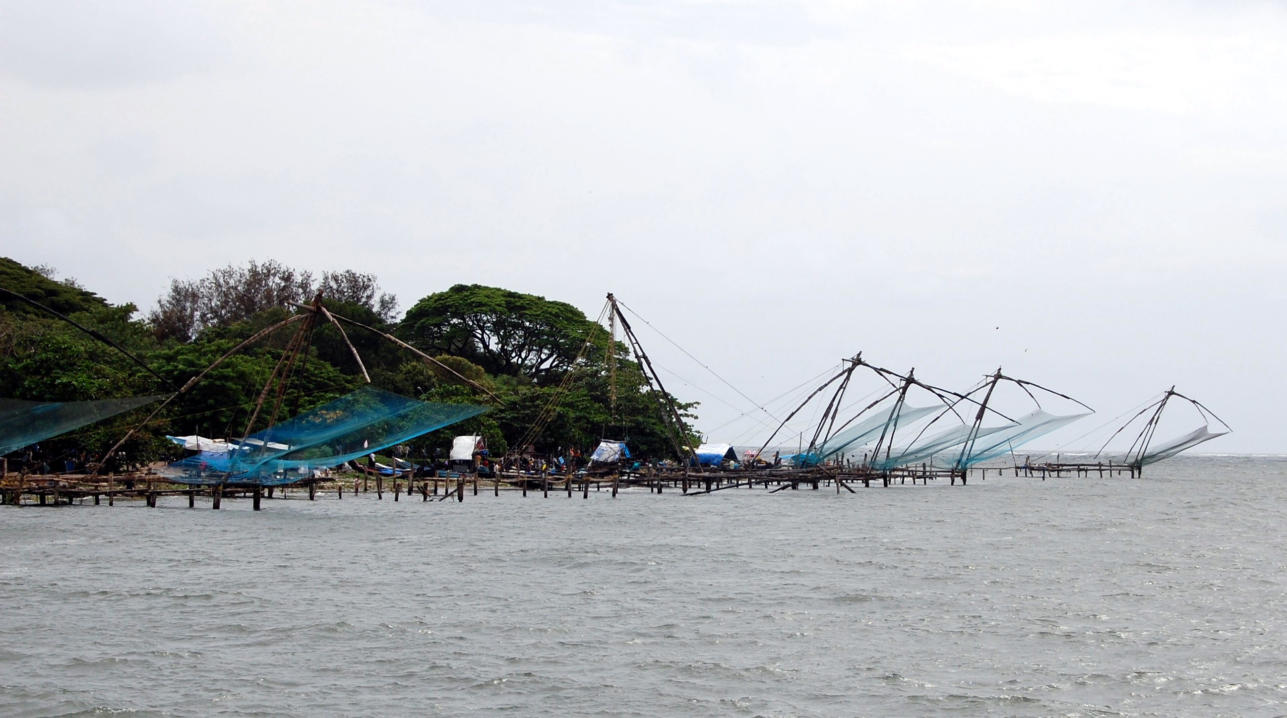 ഫോര്ട്ട്-കൊച്ചി-ചീനവലകൾ